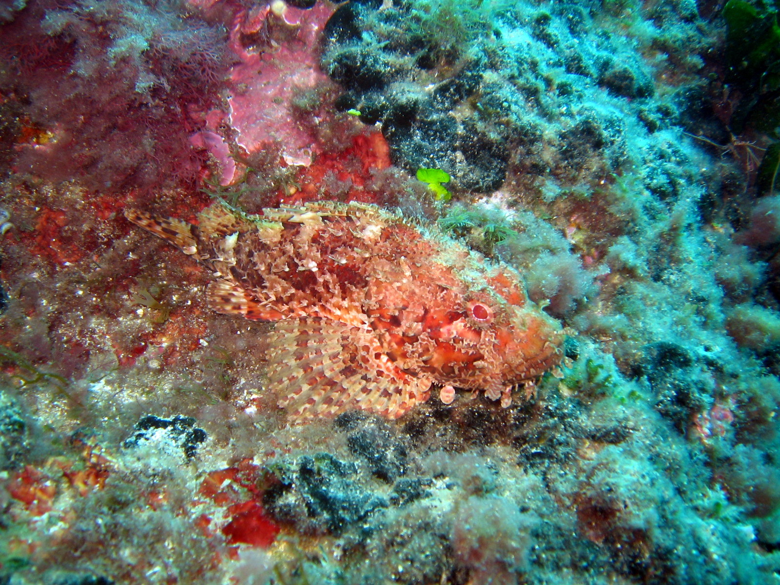 Scorpaena scrofa in Niolon